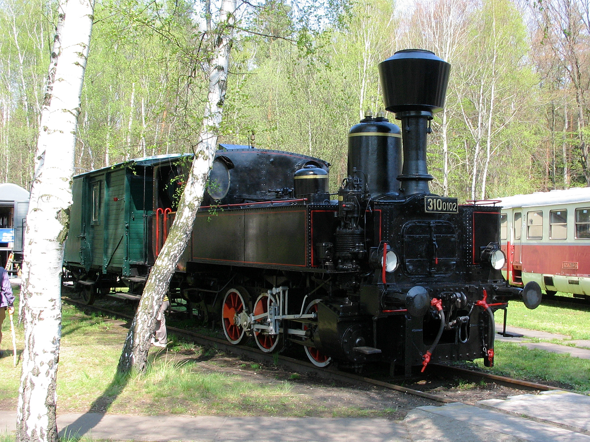 310.0102, Lužná u Rakovníka, 1. 5. 2005